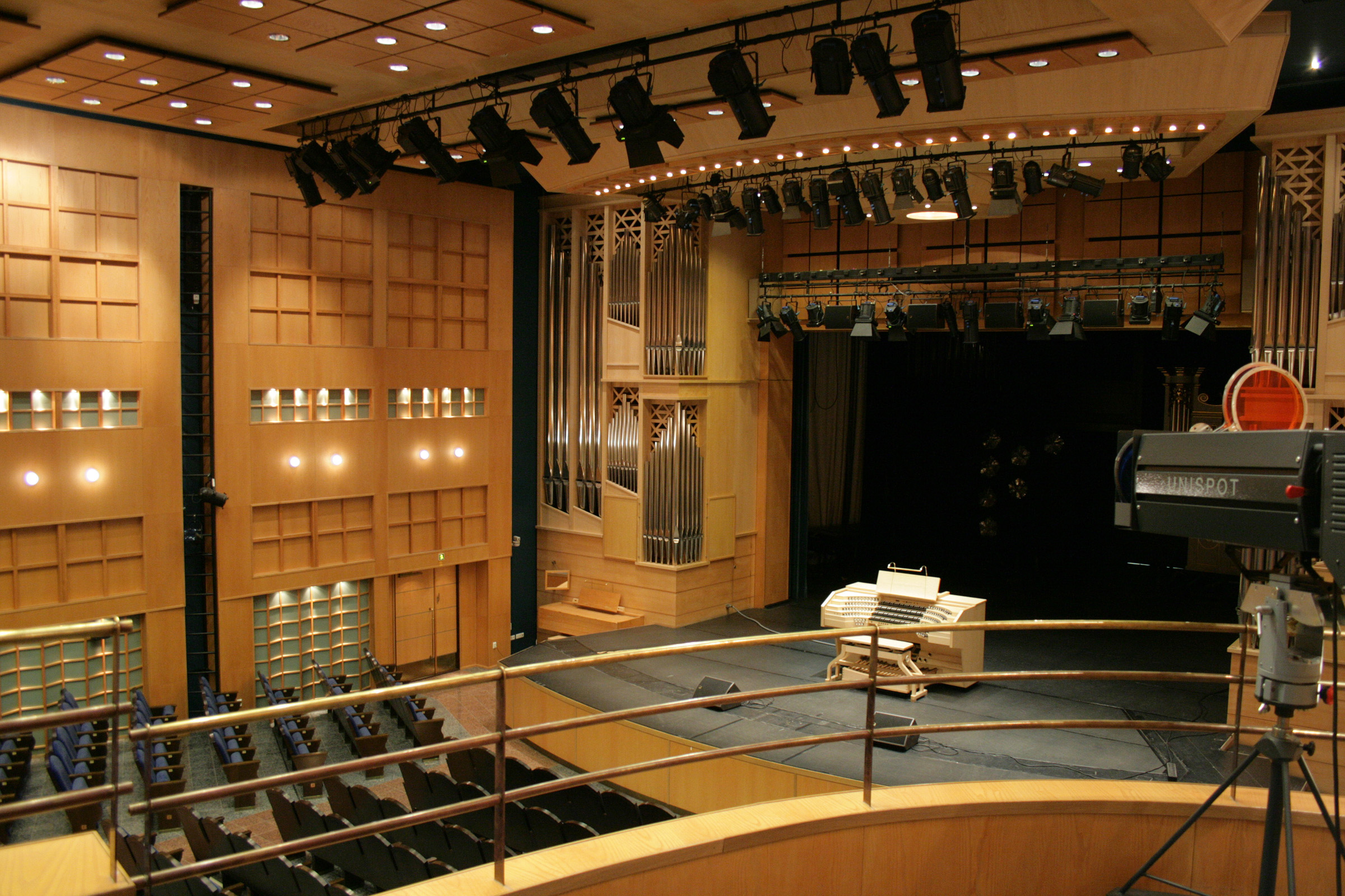 Вид на сцену Дворца искусств ОАО «Кондопога». Кондопога. Республика Карелия.